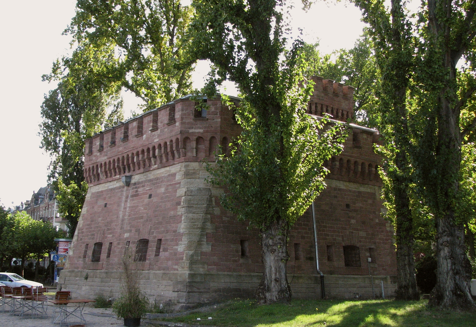 Mainz Kaponniere am Rheinufer und Feldbergplatz Festungsbauten Uferpromenade Foto 2007 Wolfgang Pehlemann Wiesbaden DSCN4707